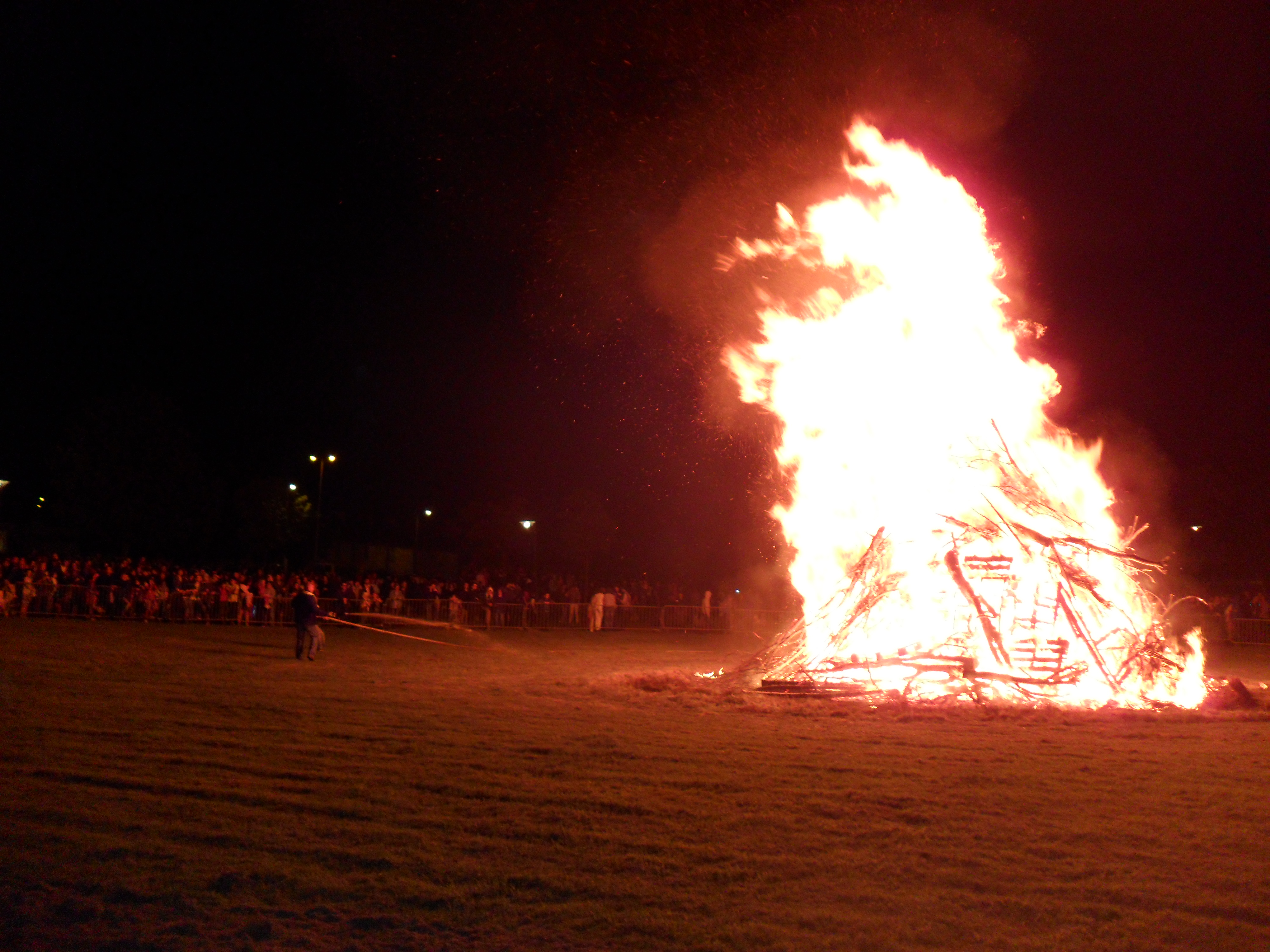 Le Feu de la Fête de la Saint-Jean, au Moulin Vert (Quimper, France)